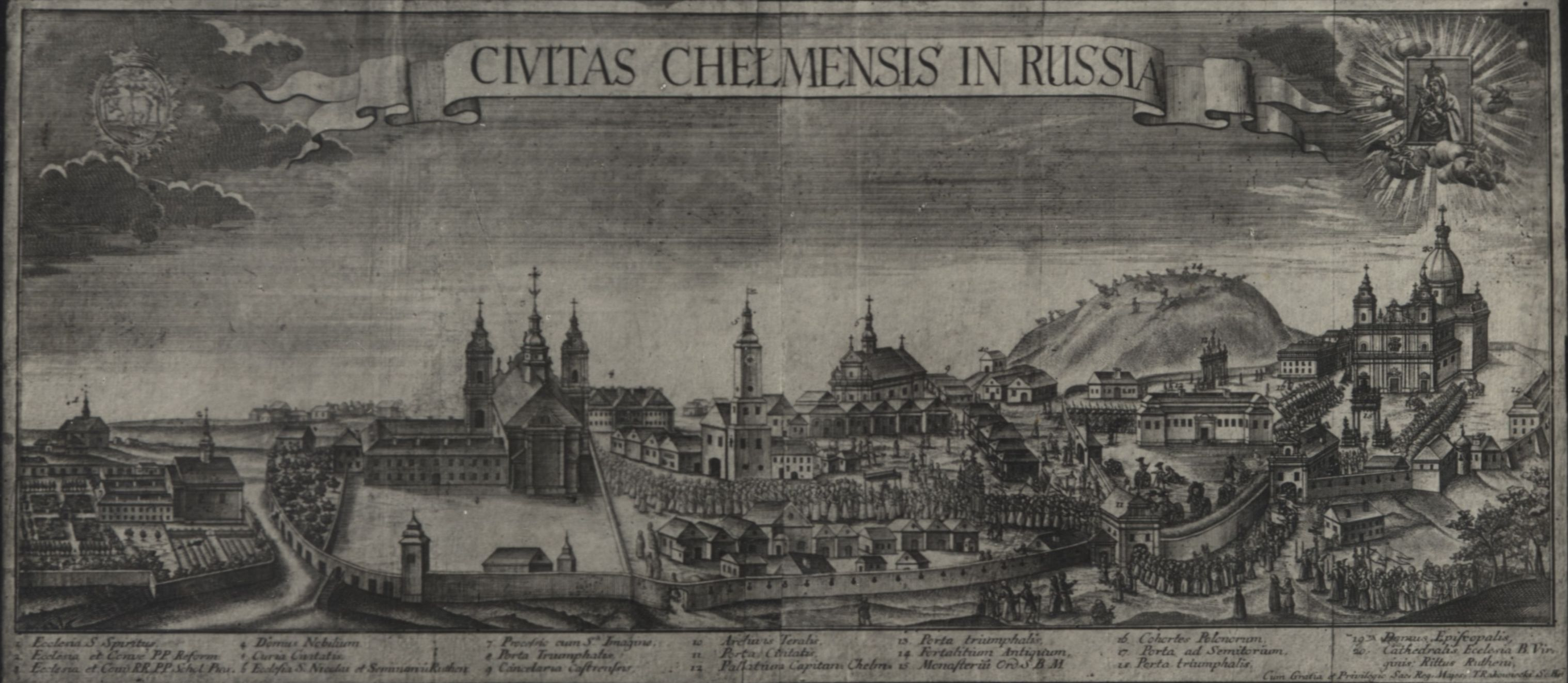 Najstarszy widok Chełma z XVIII w. Sztych T. Rakowieckiego z dzieła Koronacja cudownego obrazu Najświętszej Maryi Panny w Chełmskiej katedrze obrządku greckiego ... odprawiona roku 1765, Berdyczów 1780.